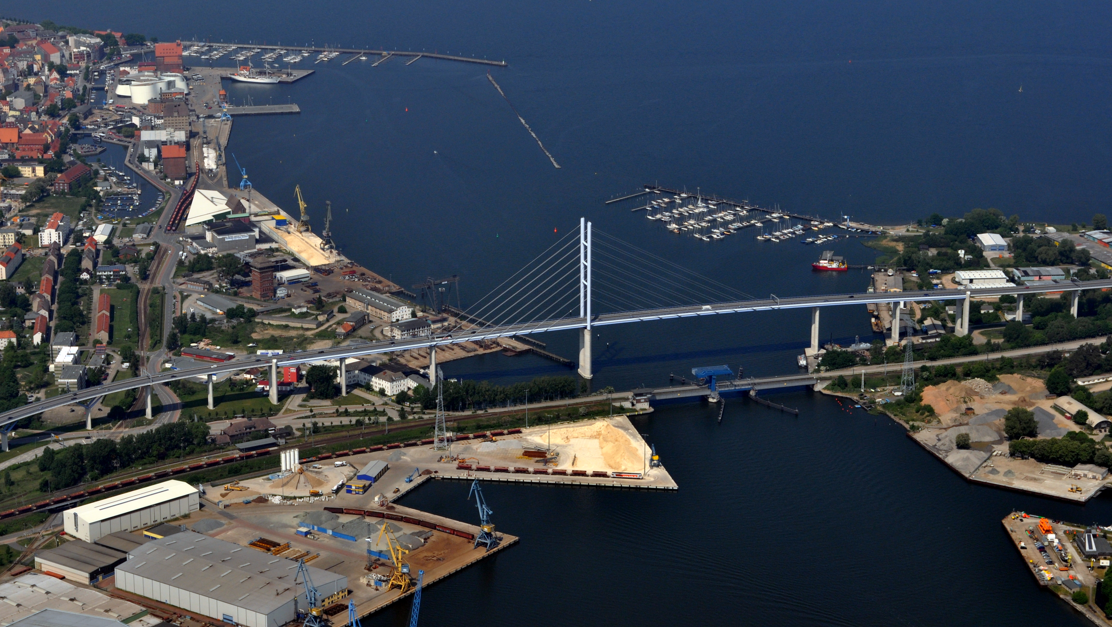 Stralsund, Rügenbrücke. Die Bilder wurden von mir während eines einstündigen Rundflugs ab Flugplatz Güttin am 21. Mai 2011 aufgenommen. Aufgenommen mit einer Nikon D5000 durch das Seitenfenster des Flugzeugs.